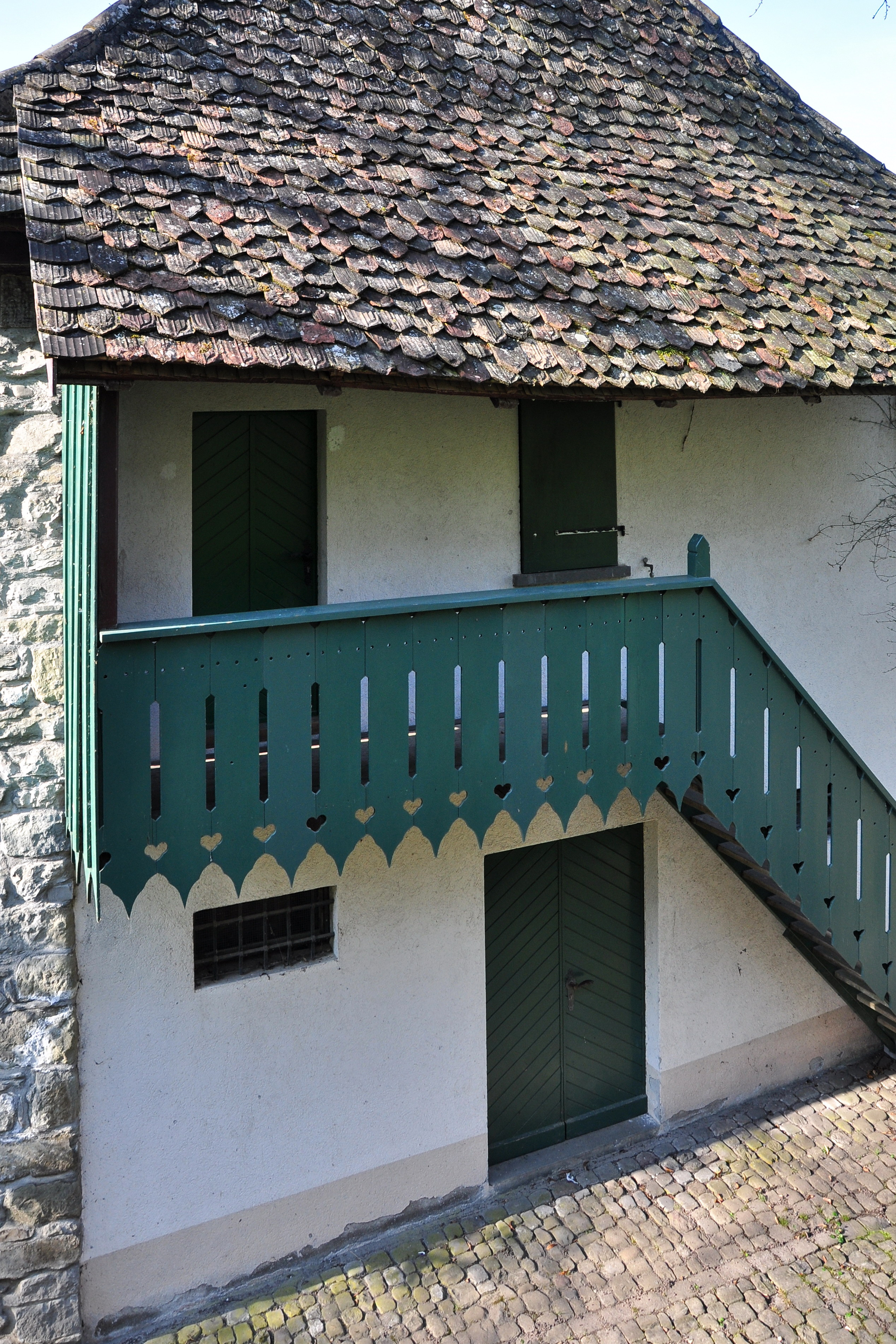 Haldenturm in Rapperswil (Switzerland)